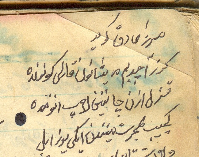 تۆرکجه: مایشان آدی کئچن ان اسکی بلگه